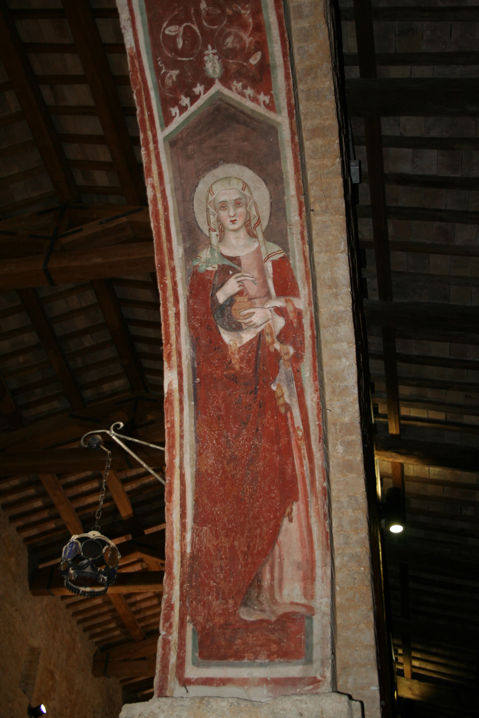 Chiesa di San Salvatore di Canzano, affresco di Santa Illuminata di Todi, interno dell'edificio religioso appartenente al complesso abbaziale omonimo nel paese di Canzano in provincia di Teramo, Abruzzo, Italia. Un sentito ringraziamento alla Dott.ssa Katia Pompetti, Assessore alla Cultura per il Comune di Canzano, che accordandomi il permesso d’ingresso, ha consentito lo scatto di questa immagine.